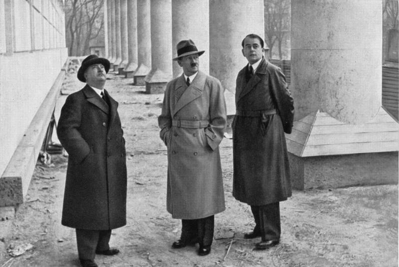 München, Ernst Gall, Adolf Hitler, Albert Speer Zentralbild Adolf Hitler besichtigt im Frühjahr 1936 den Fortgang der Bauarbeiten am "Haus der Deutschen Kunst" in München an der Prinzregentenstraße. UBz: v.l.n.r.: Prof. Ernst Gall, Adolf Hitler und Architekt Albert Speer. Abgebildete Personen: Hitler, Adolf: Reichskanzler, Deutschland Speer, Albert Prof. Dr.: Reichsminister für Rüstung und Kriegsproduktion, Architekt, Deutschland (GND 118615998) Gall, Ernst Prof.: , Deutschland